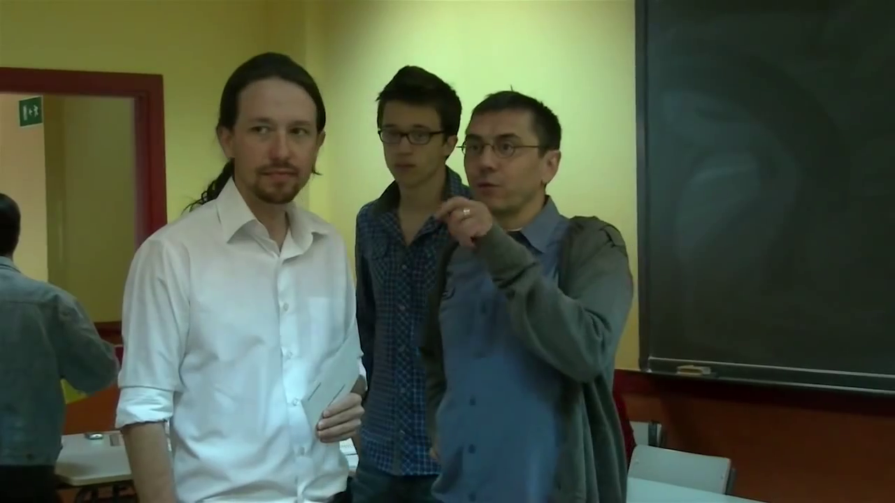 Pablo Iglesias junto con Íñigo Errejón y Juan Carlos Monedero votando en el Instituto Tirso de Molina de Vallecas en las elecciones europeas de mayo de 2014